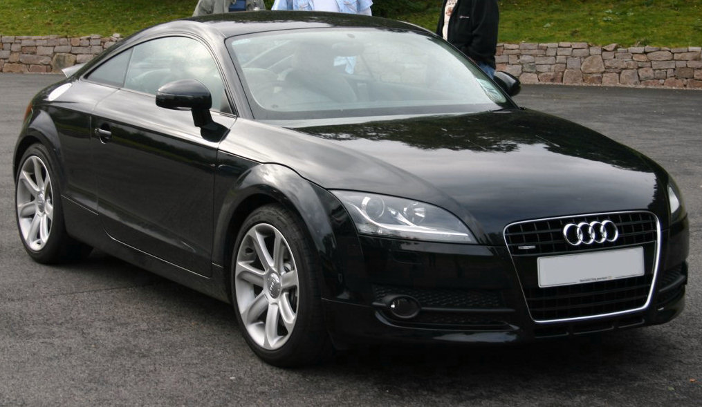 Audi TT, 3.2L V6, S-Tronic